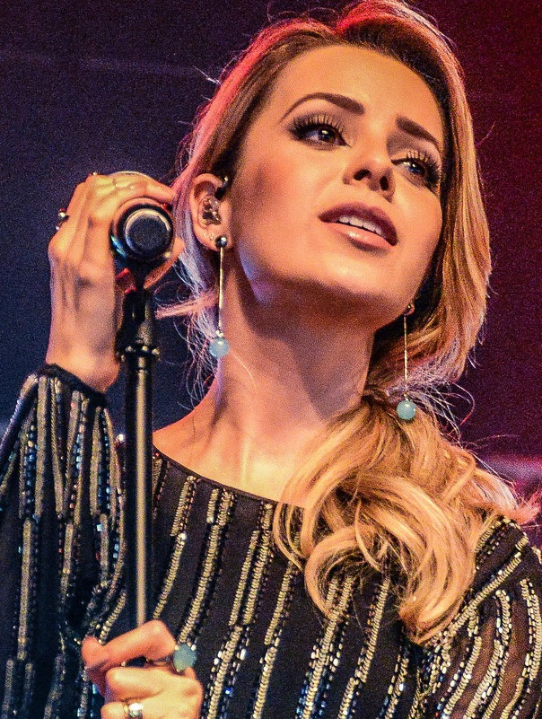 Sandy em participação no show do cantor Tiago Iorc no Festival Nova Brasil FM.